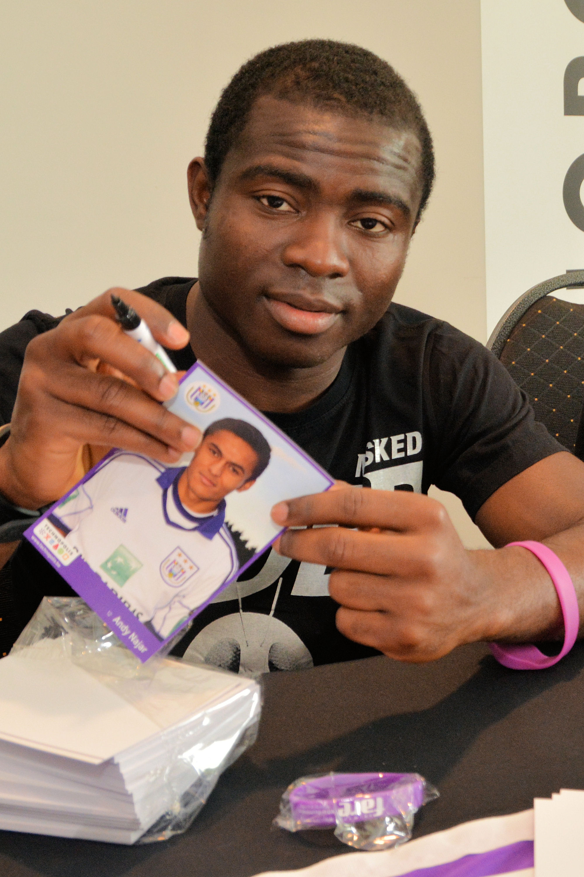 Frank Acheampong, middenvelder bij RSC Anderlecht tijdens een signeersessie in het Doe-centrum Technopolis Mechelen.